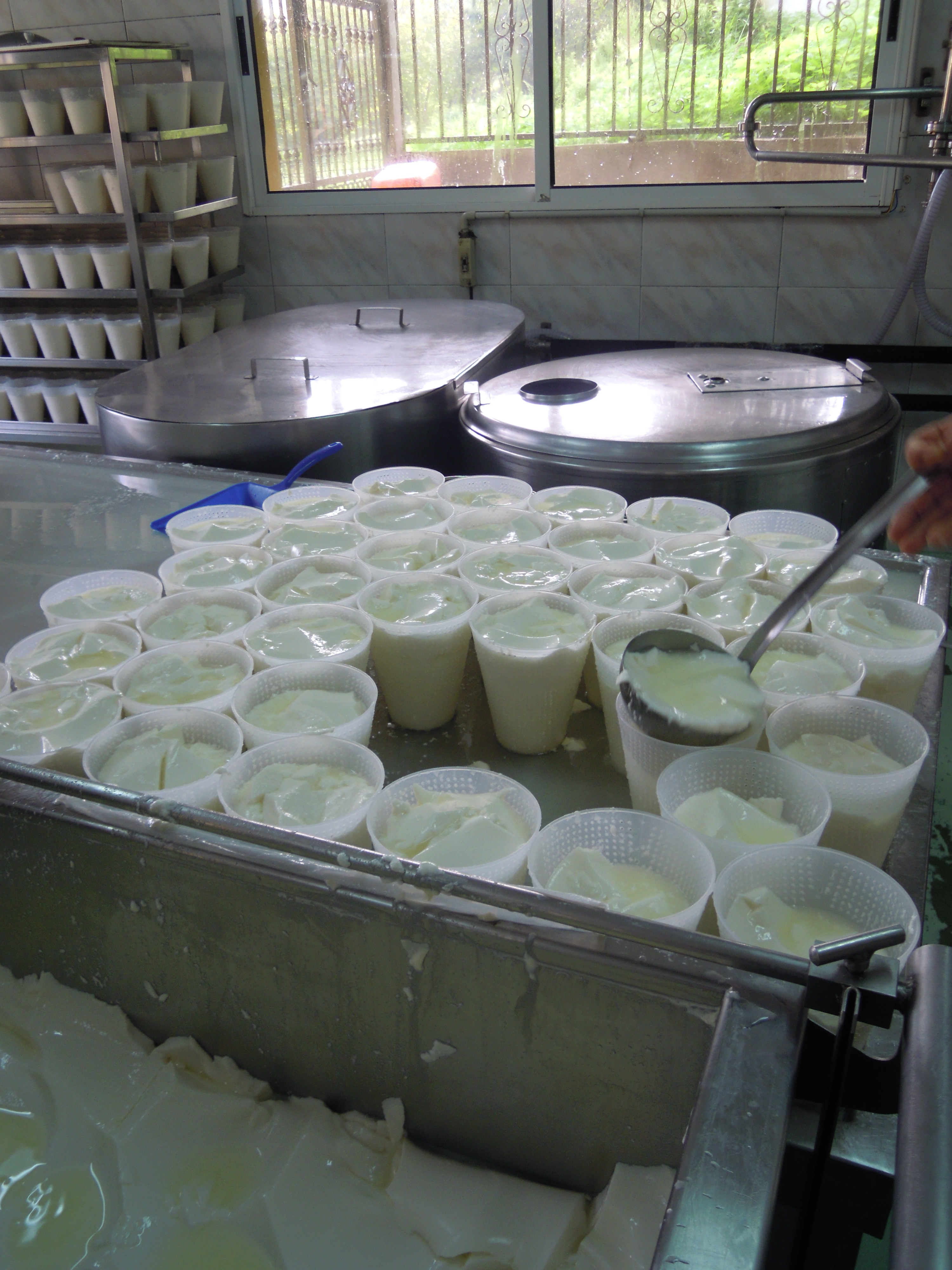 Moldes onde se desuera